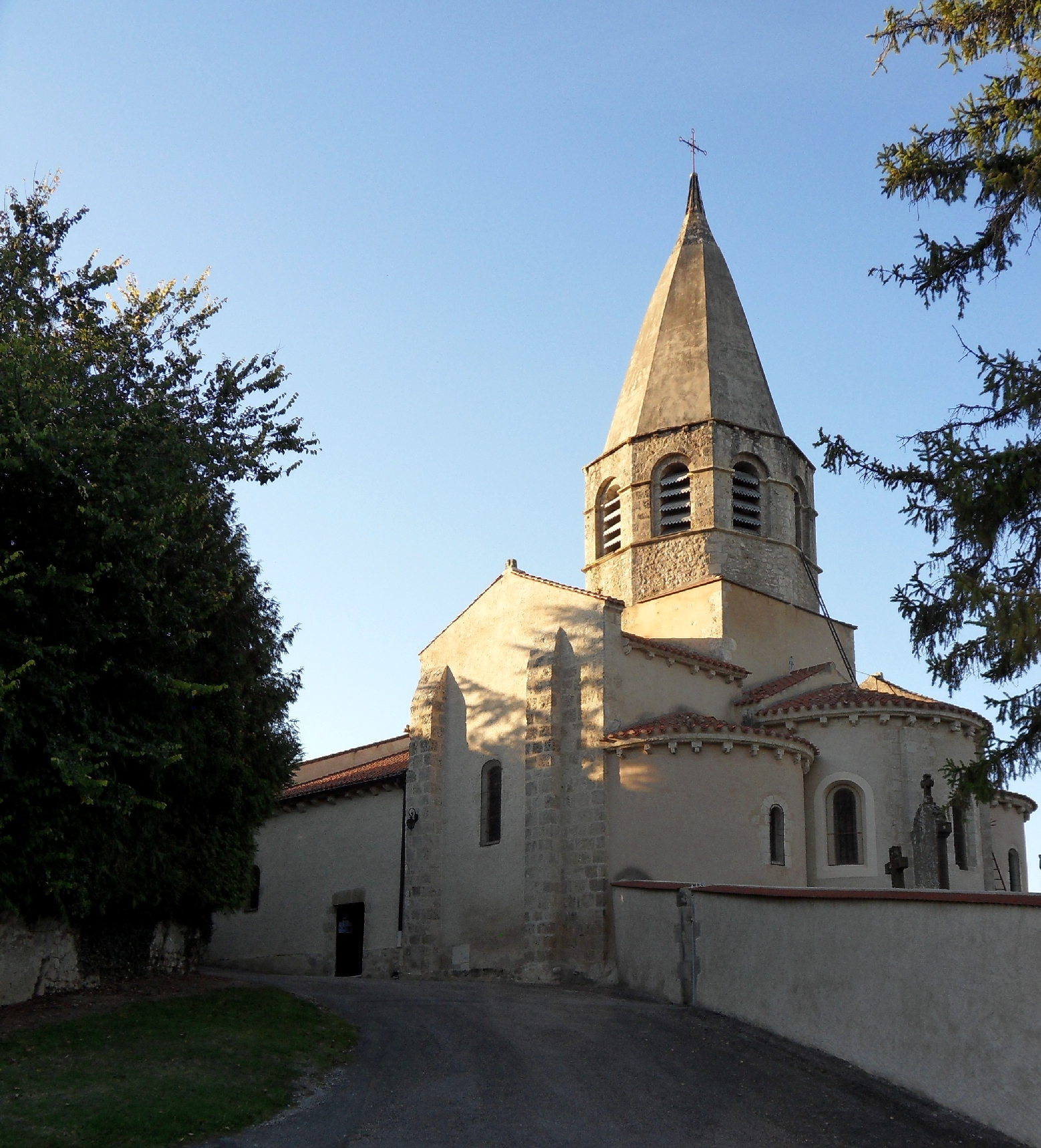 Église Saint-Georges, (Classé, 1967) .